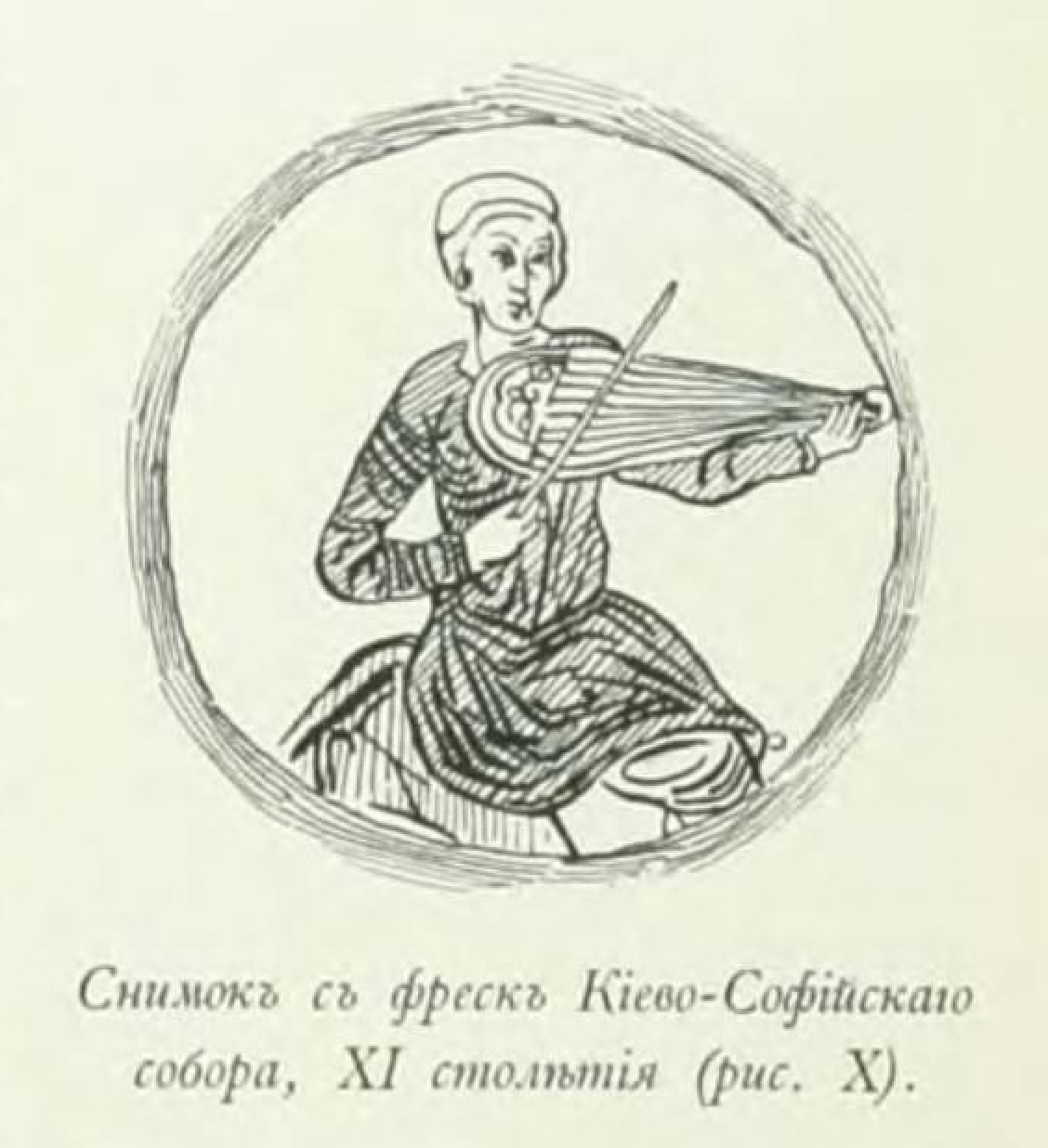 С фрески Софийского собора в Киеве. XI век. Из книги «Великокняжеская, царская и императорская охота на Руси»